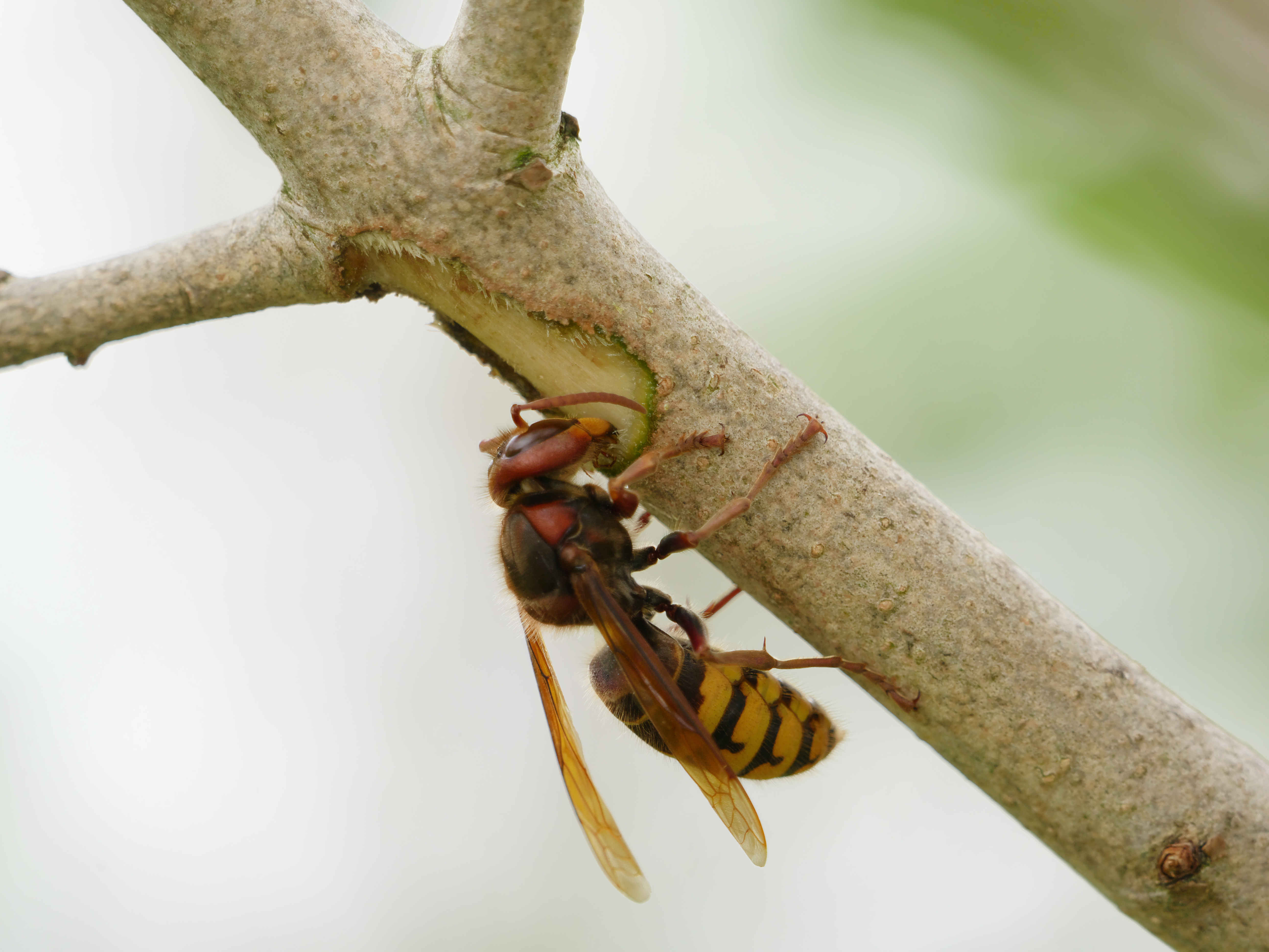 An der Rinde eines jungen Fliederzweig nagende und Baumsaft saugende Hornisse.